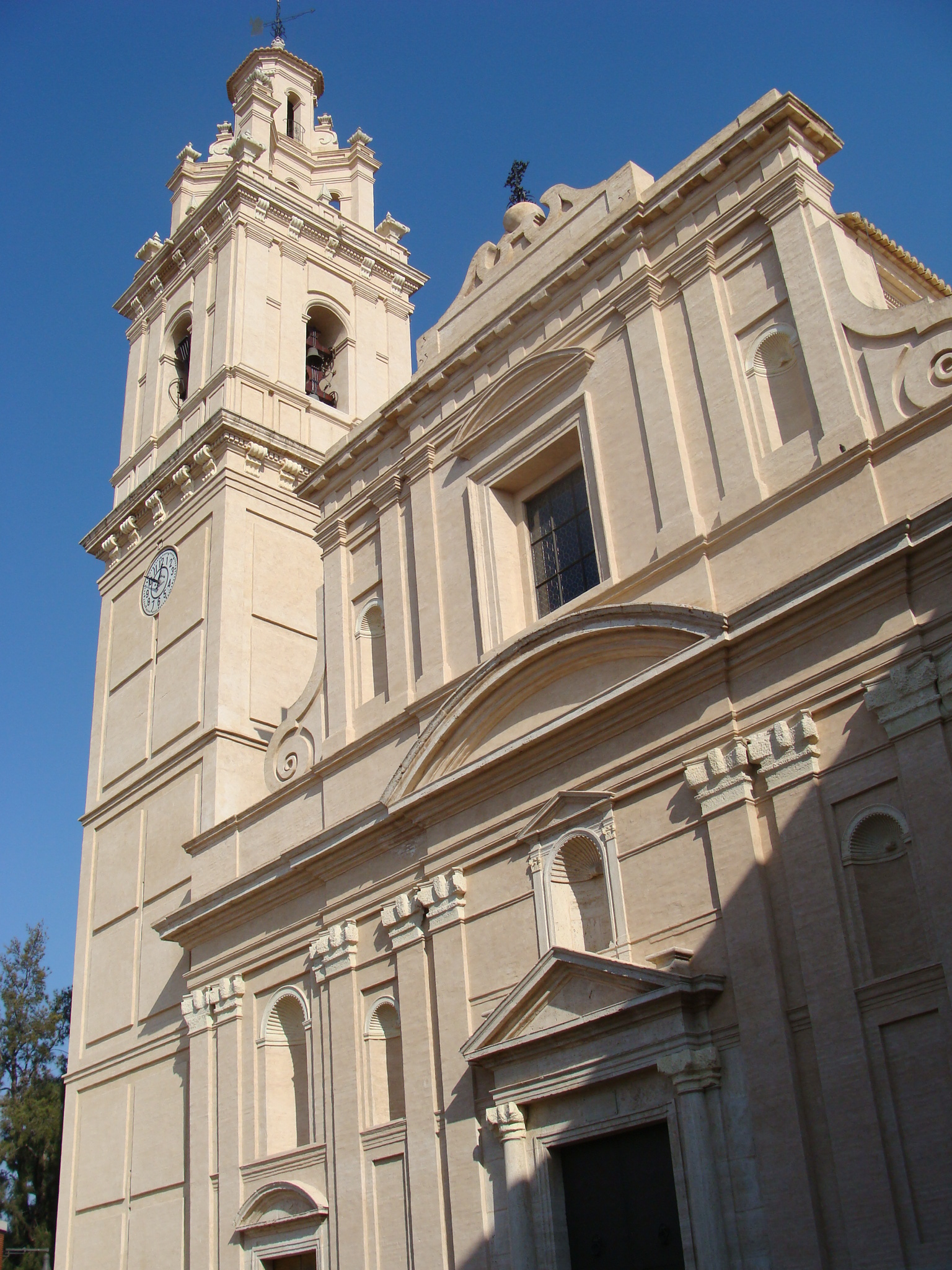 Iglesia de Alcudia de Carlet (Provincia de Valencia)